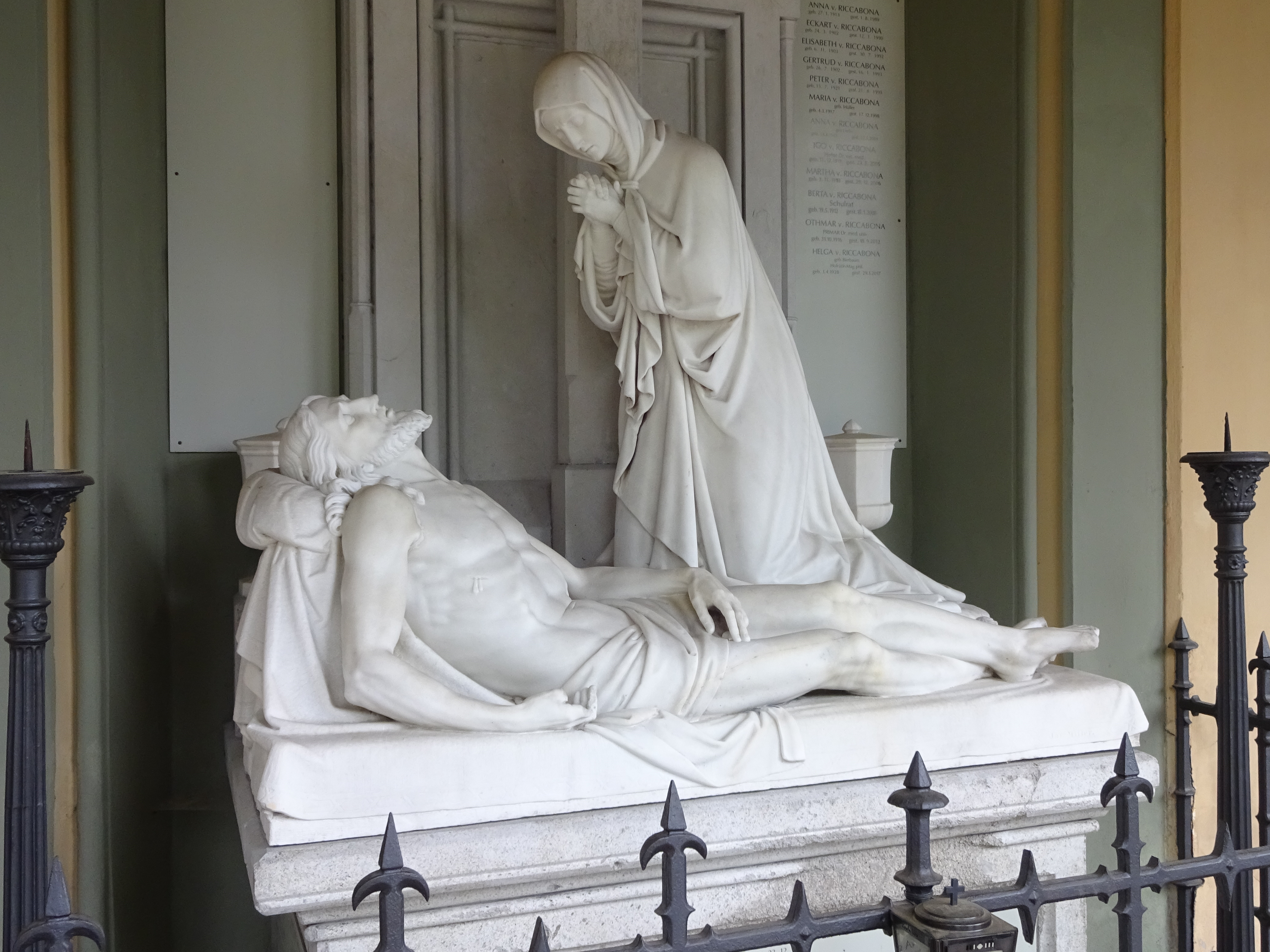 Westfriedhof Innsbruck, Riccabona'sche Grabstätte in den Südarkaden des nördlichen Teils: Marmorgruppe Beweinung Christi von Josef Miller, 1860